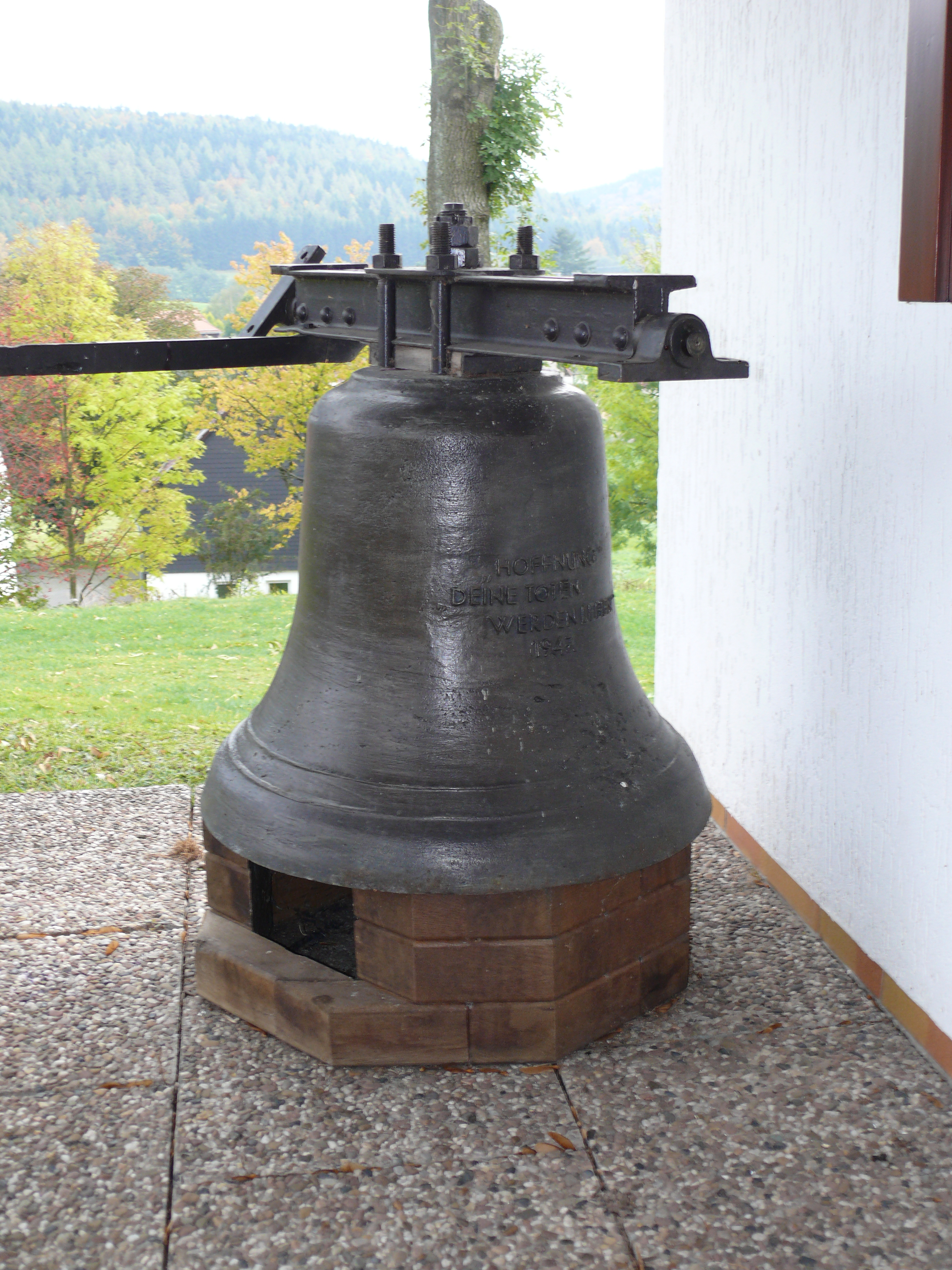 Alte Glocke von Willingen-Eimelrod. Die Glocke befindet sich vor der Friedhofskapelle, hinter der Kirche von Eimelrod. Die Inschrift lautet: "HOFFNUNG" DEINE TOTEN WERDEN LEBEN 1947